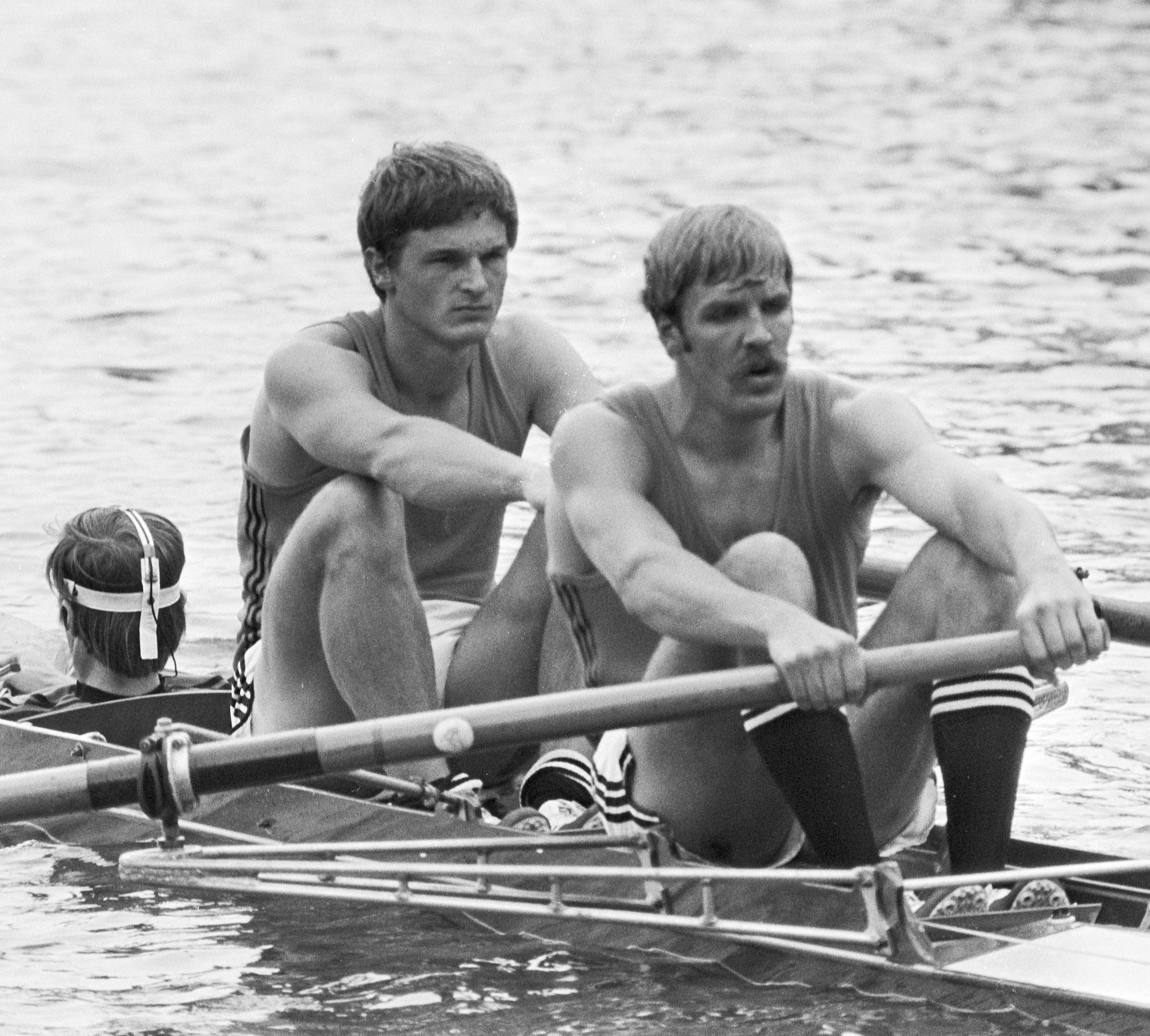 WK roeien op Bosbaan; heren twee zonder Van der Plas en Kroes (links)